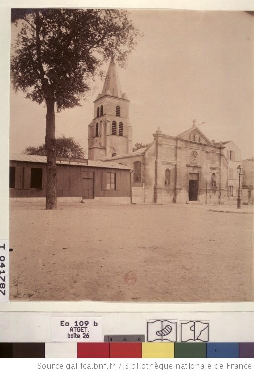 Saint-Ouen : vieille Eglise. N ° Atget : 6198. 1901. Photographie positive sur papier albuminé d'après négatif sur verre au gélatinobromure ; 21,1 x 17,1 cm (épr.). [Cote : BNF - Est. Eo 109b bte 26 ; n ° micr. T041787] \ Opaline 021389